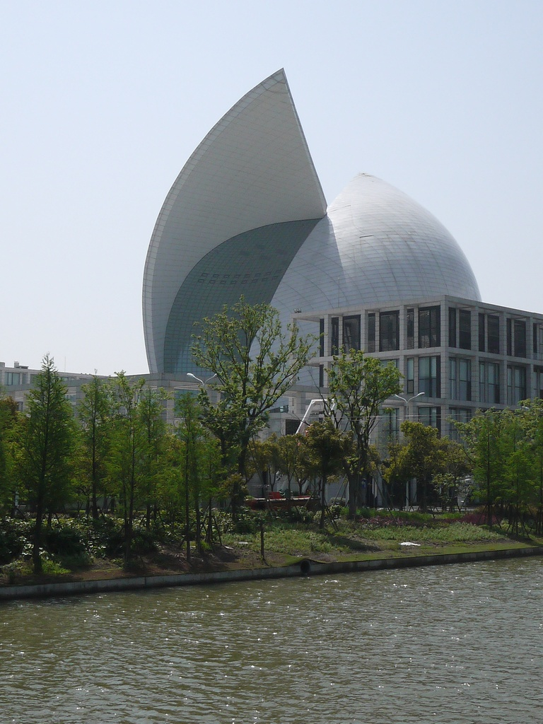 中国航海博物馆的主体建筑